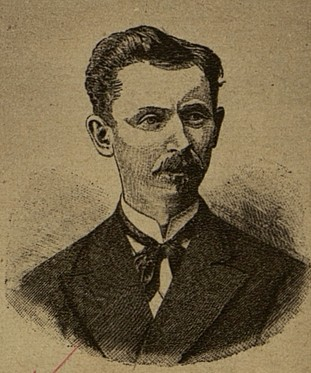 Koloman Banšell - slovenský evanjelický kňaz, spisovateľ, literárny teoretik, novinár